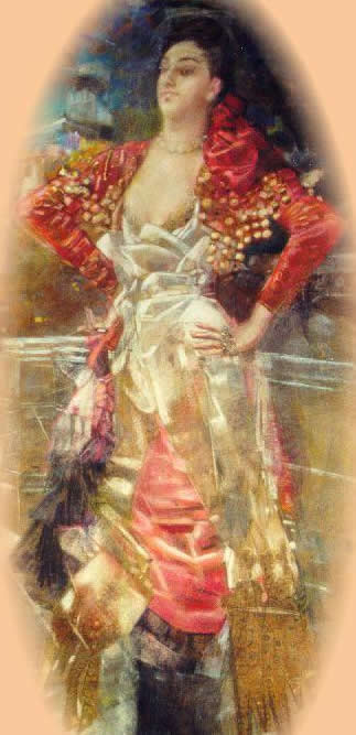 Врубель Михаил Александрович "Портрет Каролины Августы Отеро (1869? – 1965), испанской танцовщицы и певицы, гастролировавшей в Петербурге в театре «Омон» на рубеже 19-20 вв." 1898